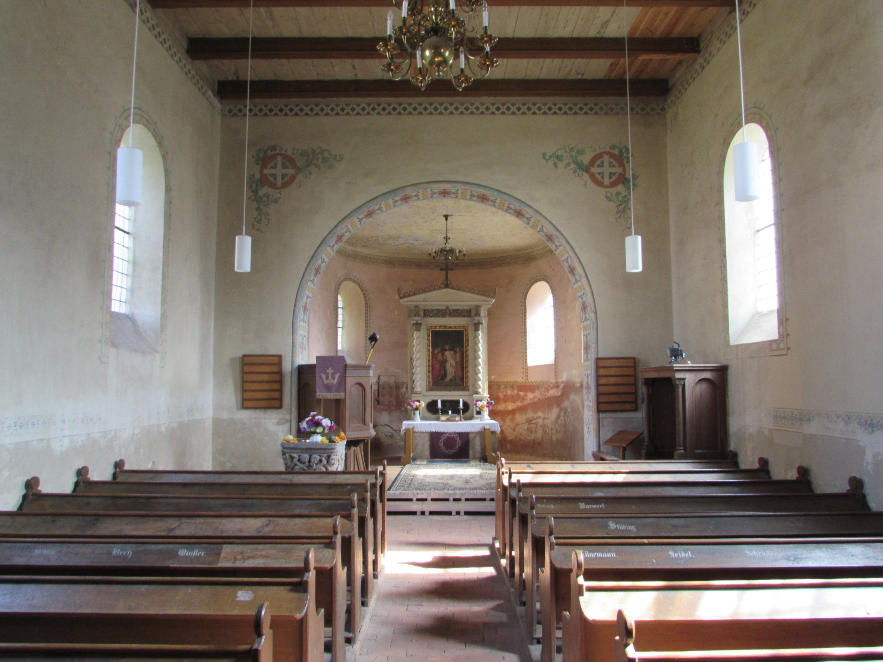 Dorfkirche Bücknitz, Blick in Richtung Chor